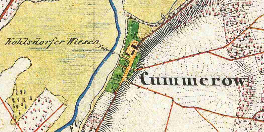 Kummerow, Ortsteil der Stadt Beeskow, Lkr. Oder-Spree, Brandenburg, Deutschland, Ausschnitt aus dem Urmesstischblatt 3851 Beeskow von 1846